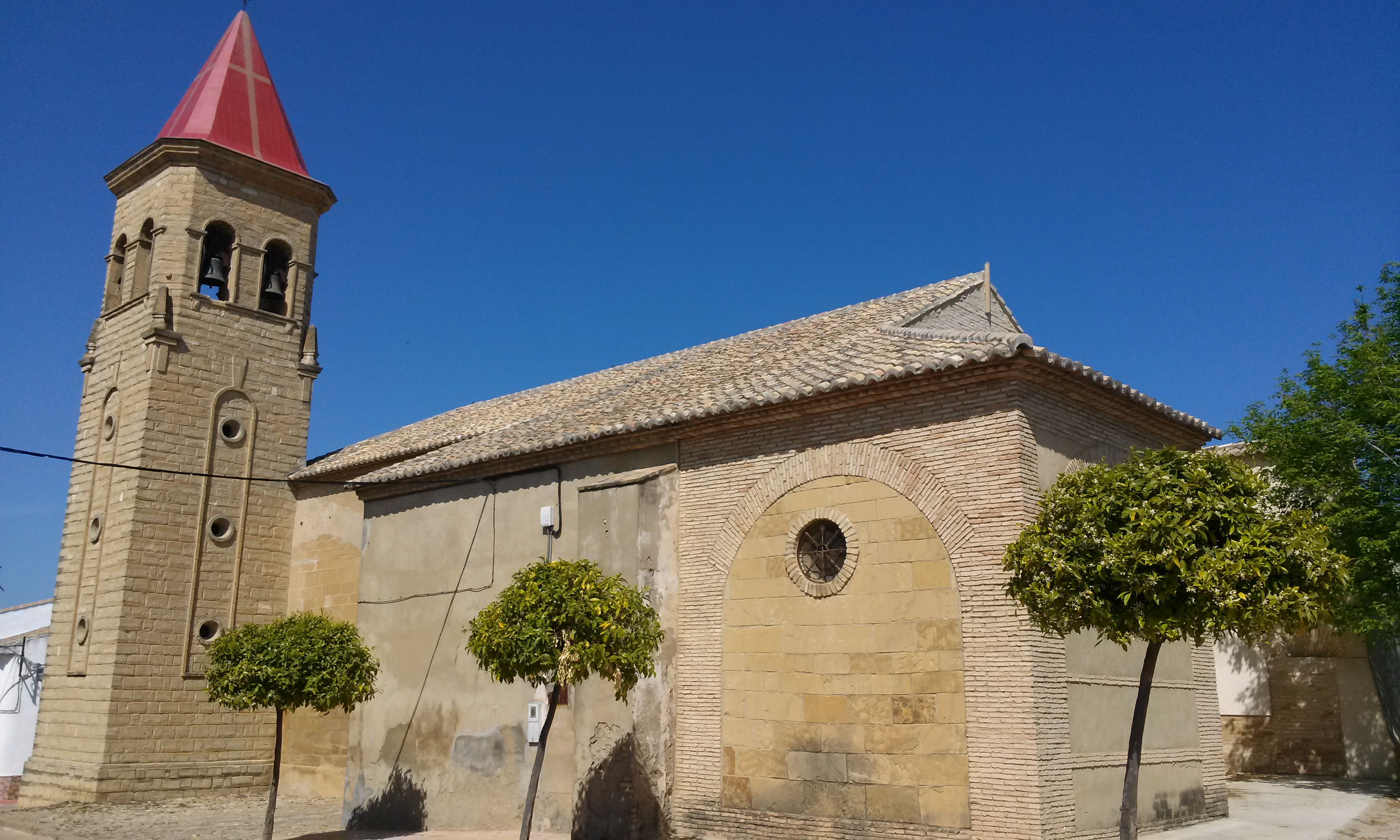 Vista de la iglesia de Nuestra Señora María Consolación, Lahiguera.